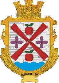 Герб Недобоївської сільської територіальної громади